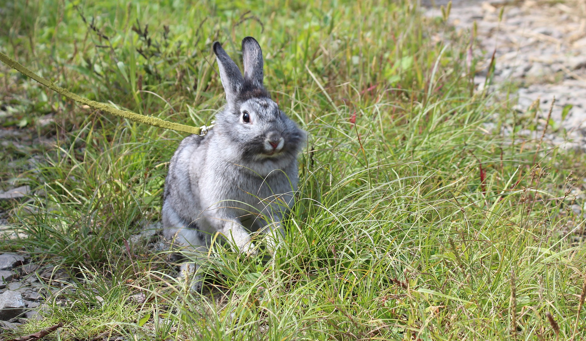 Серый домашний кролик